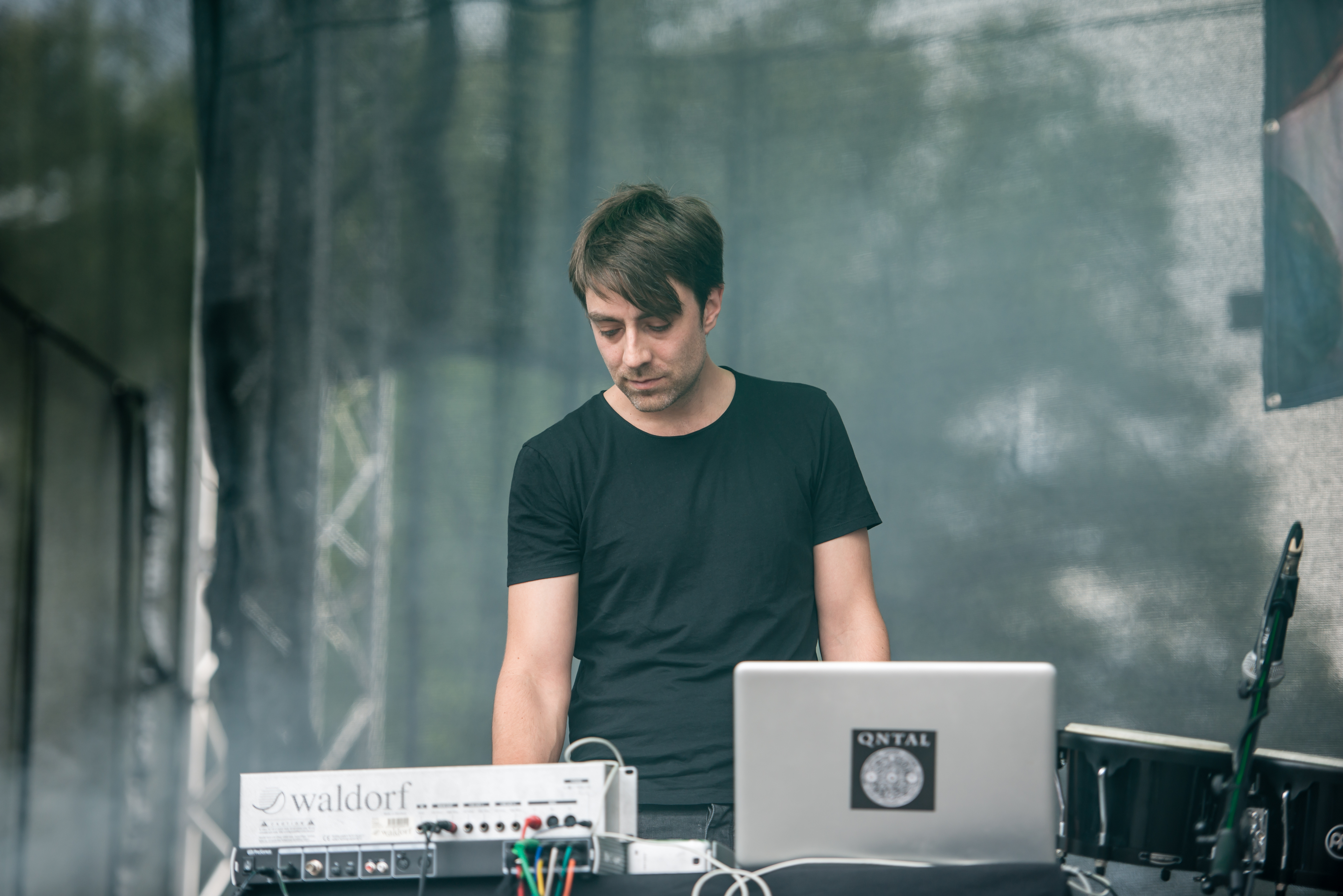 'Amphi Festival 2015; Köln - Lanxess Arena': 'Qntal'